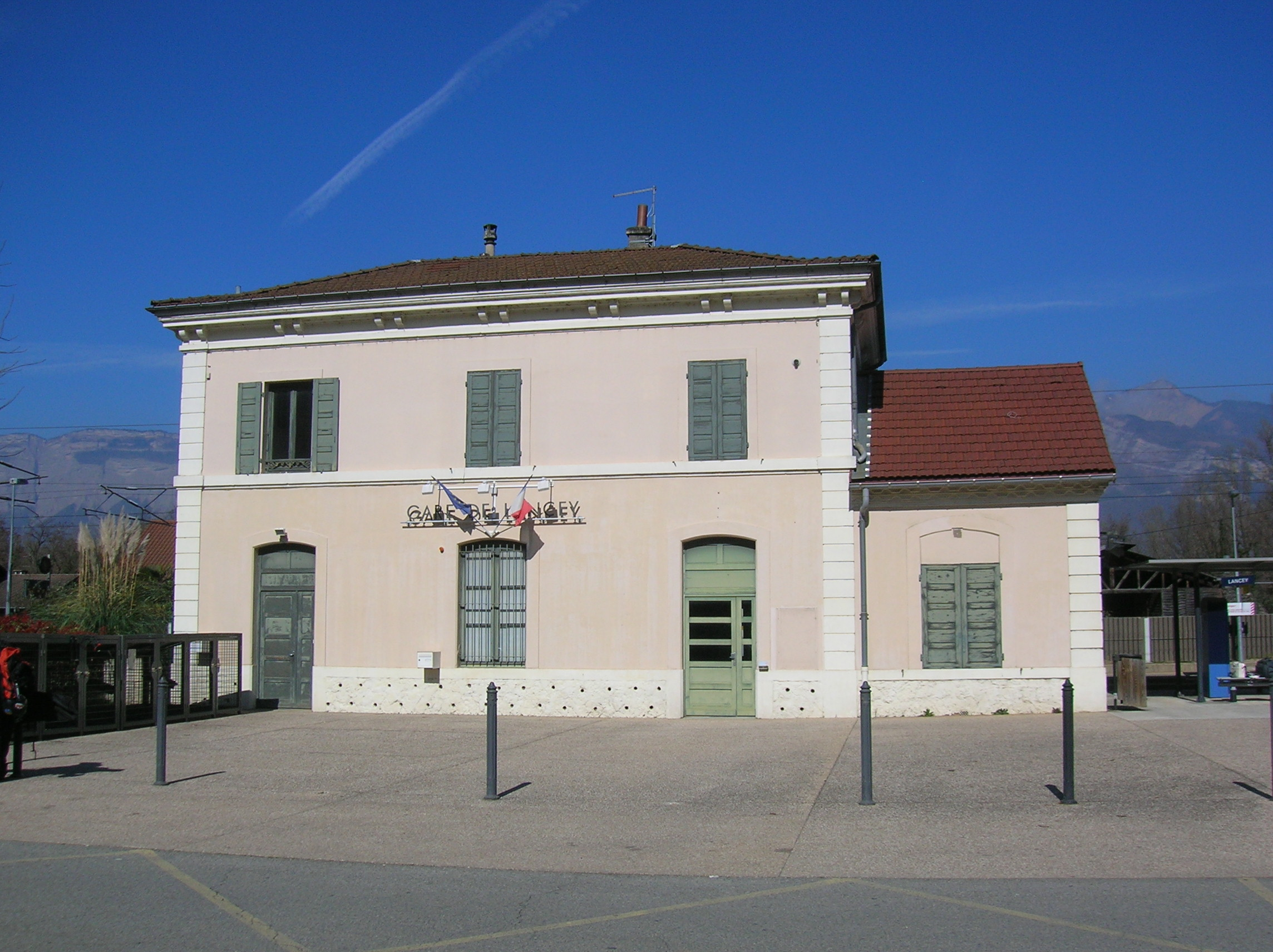 Gare de Lancey (38)